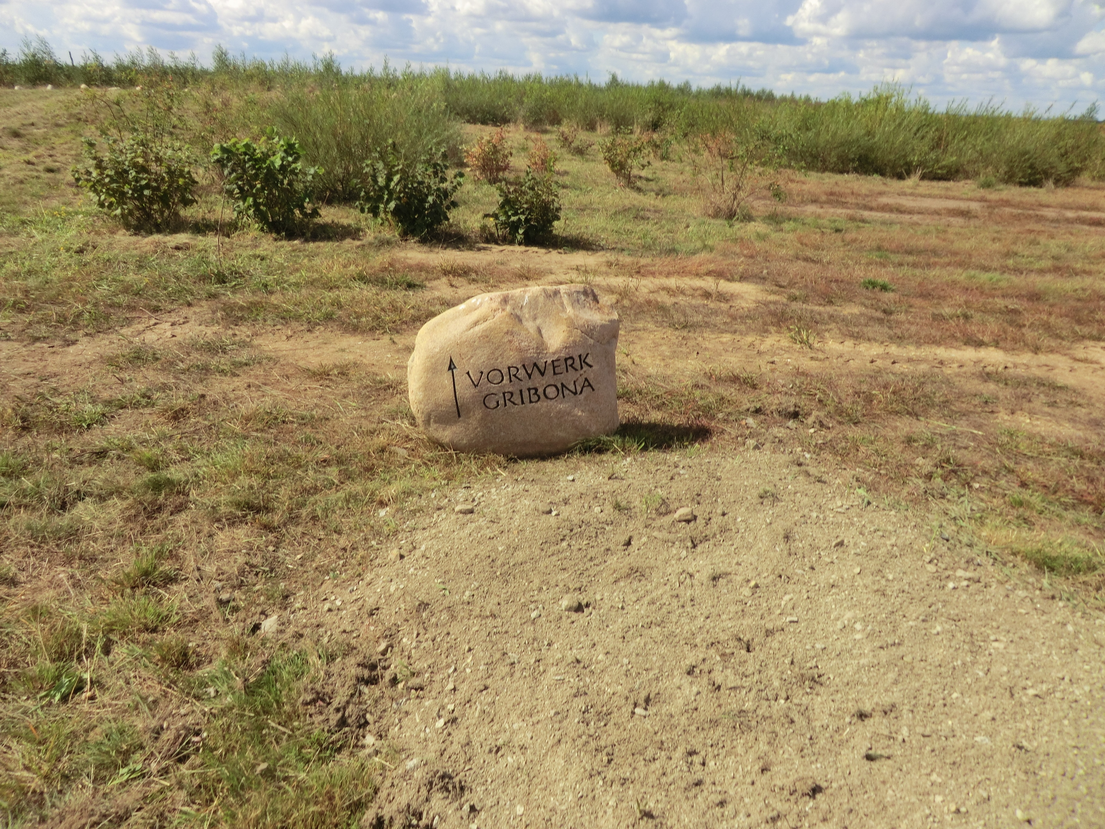 Stein Vorwerk Gribona - Wolkenberg (Spremberg)